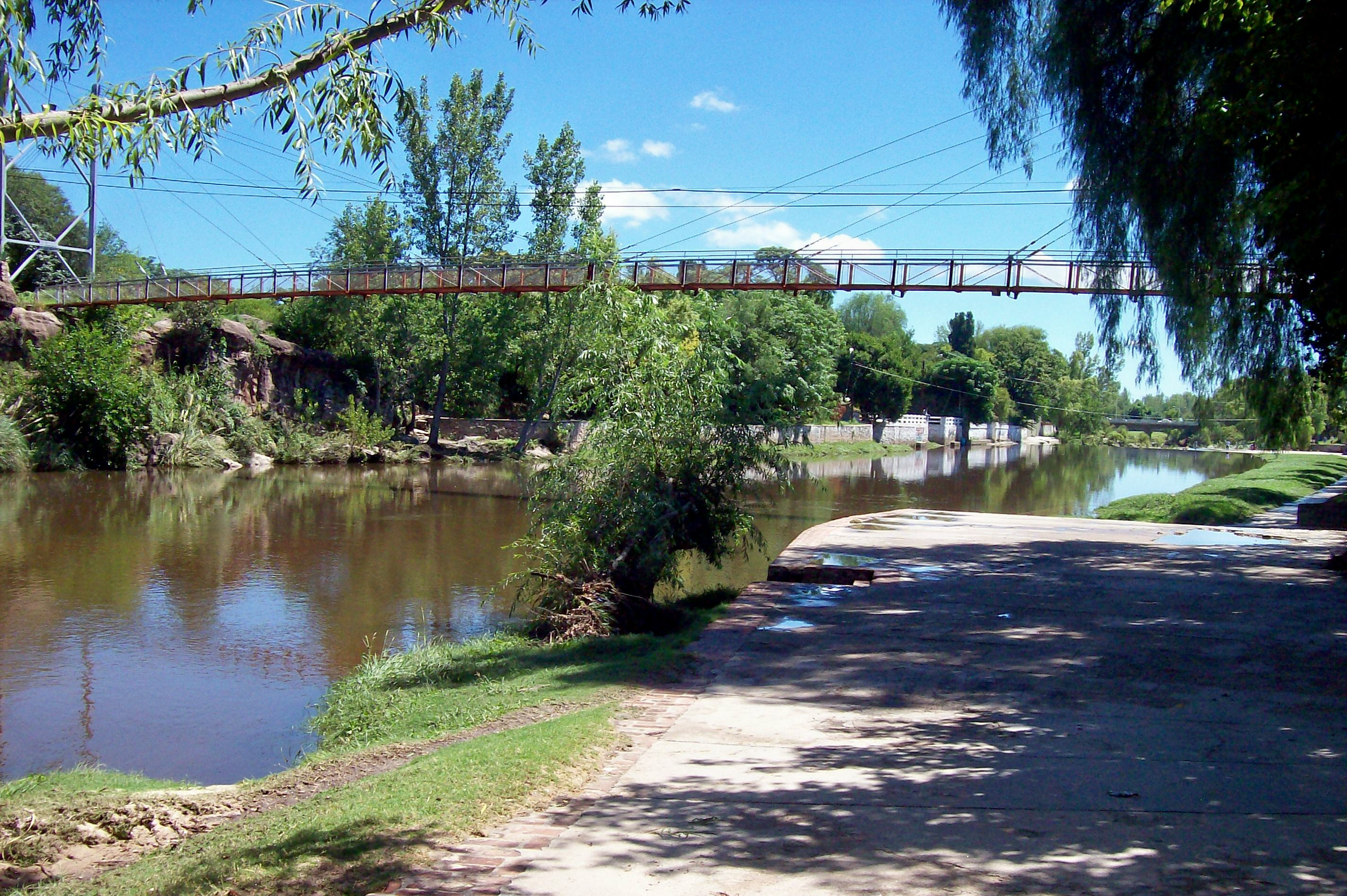 Pasarela sobre calle Milac Navira, en río Mina Clavero. Córdoba, Argentina.